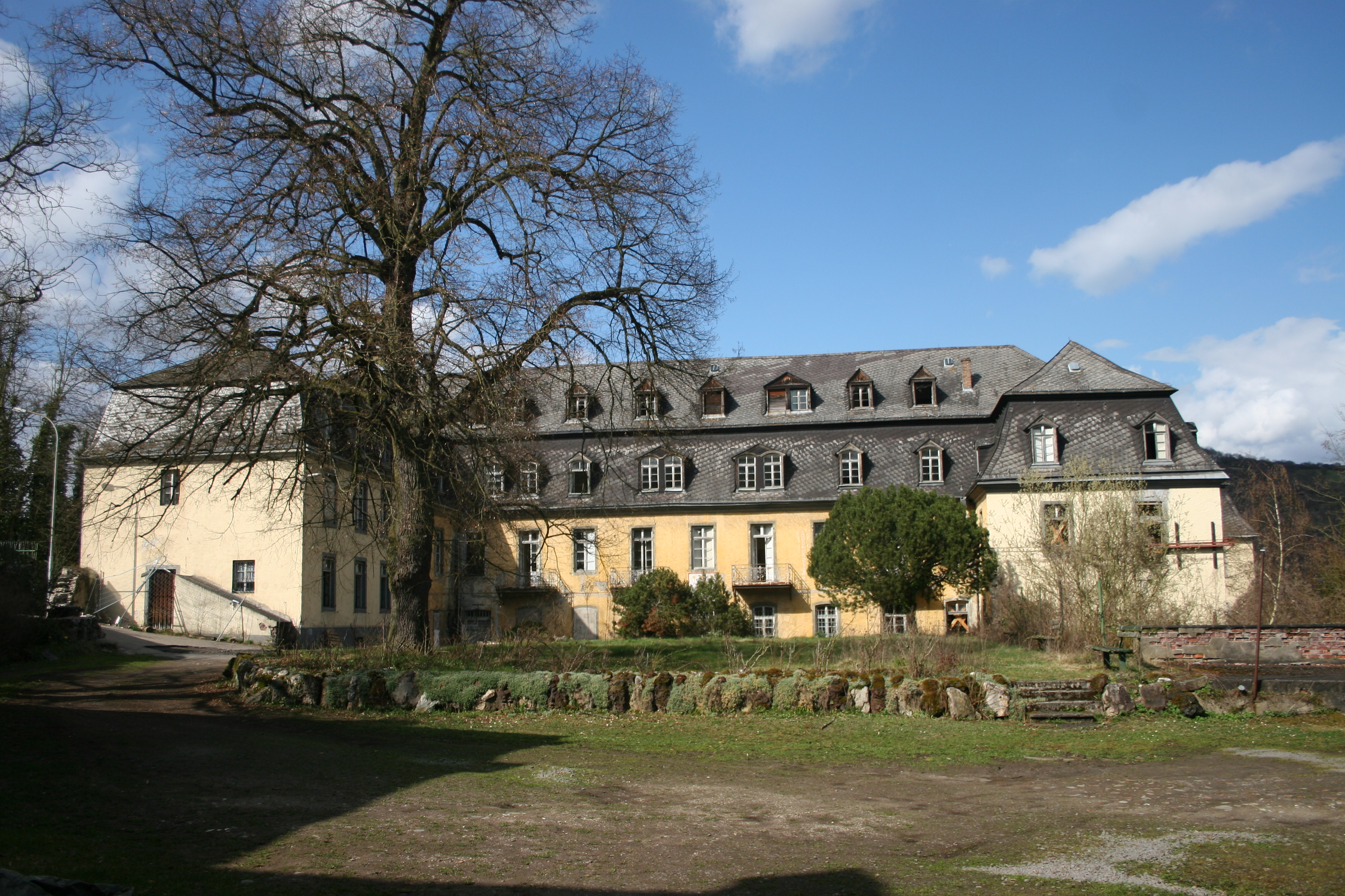 Kloster Marienberg, Hauptgebäude, Rückseite